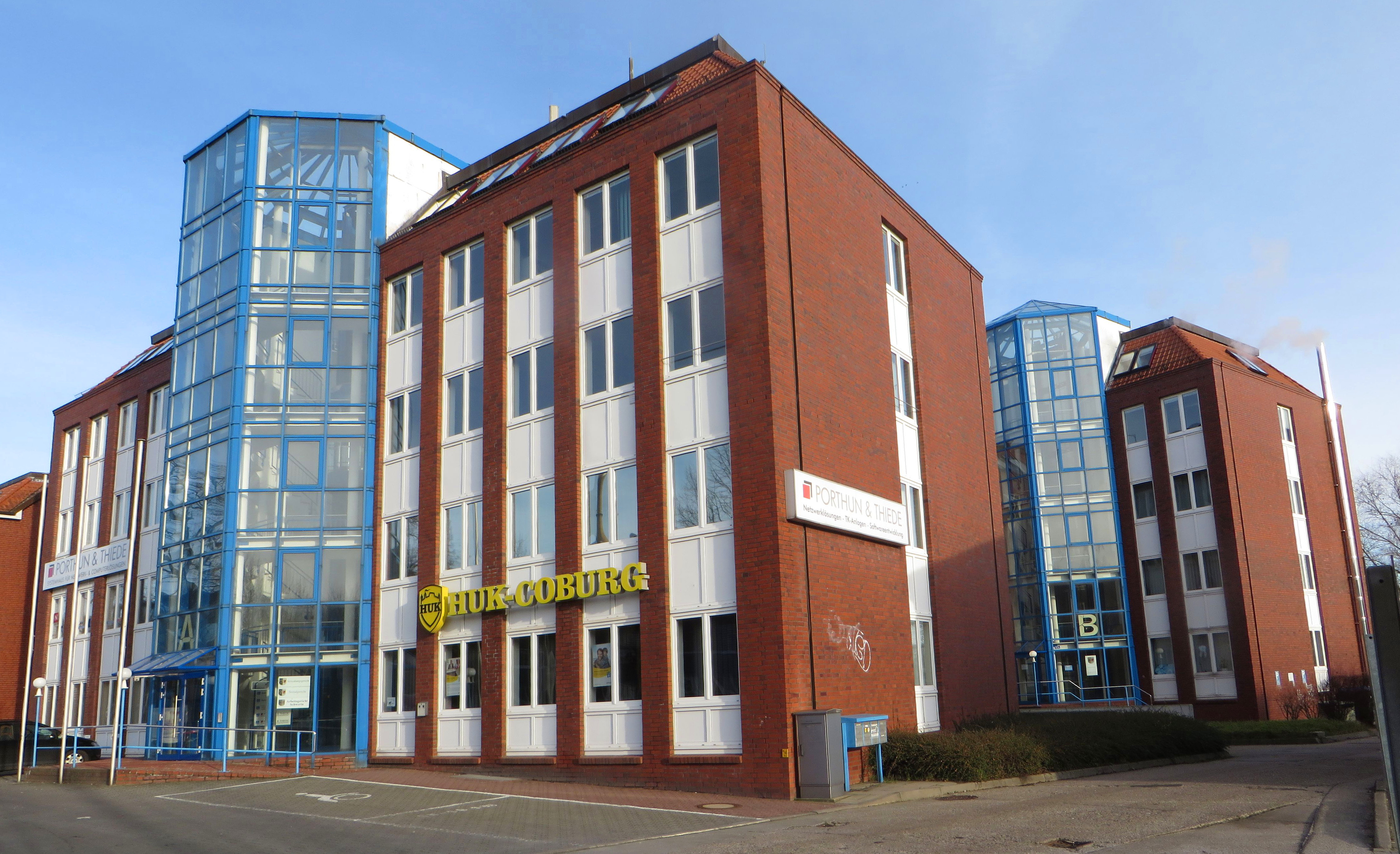 Gebäude des Arbeits-, Sozial- und Verwaltungsgerichtes Schwerin, Wismarsche Straße 323 a NOTE: This image is a panorama consisting of 2 frames that were merged or stitched in software. As a result, this image necessarily underwent some form of digital manipulation. These manipulations may include blending, blurring, cloning, and color and perspective adjustments. As a result of these adjustments, the image content may be slightly different than reality at the points where multiple images were combined. This manipulation is often required due to lens, perspective, and parallax distortions.